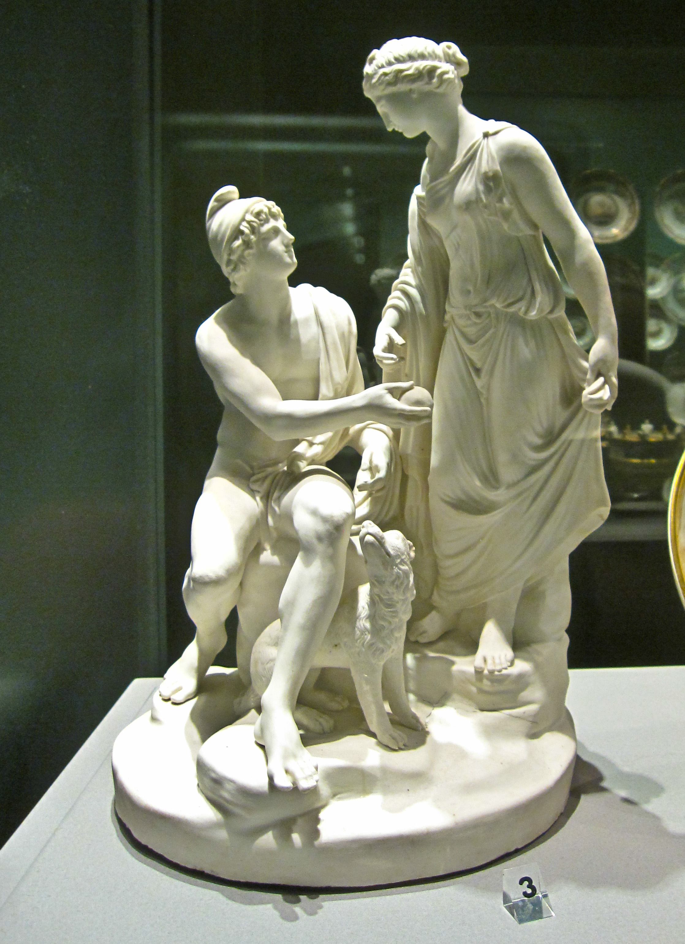 Porcellana di Capodimonte (Napoli) - Museo di Capodimonte, Appartamento Reale (inv. OA 5221). Filippo Tagliolini (1745-1809) - Venere e Paride.